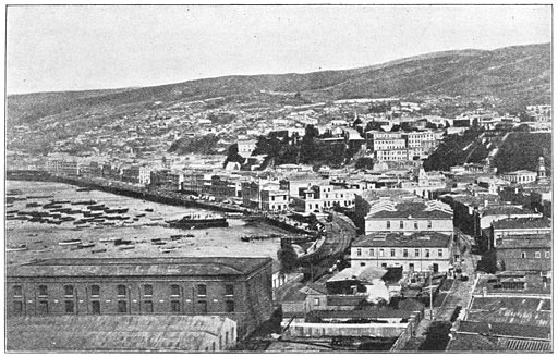 Santiago in vogelvlucht [sic] (is Valparaíso). Kijkjes in een mooi werk over Chili. De Aarde en haar Volken, 1906